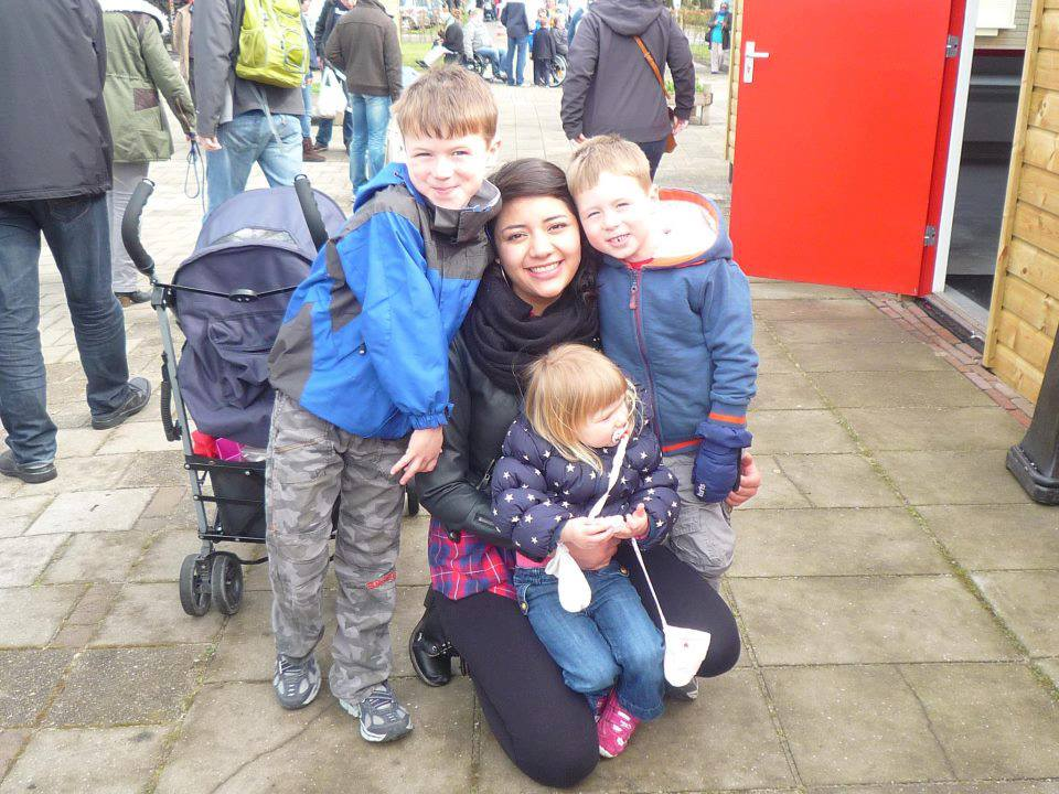 Robert, Alexander e Isabela son tres niños de Holanda que Natacha Guevara Au Pair Ecuatoriana cuida.